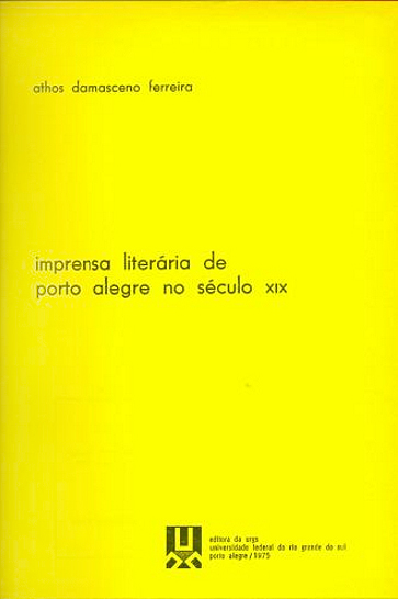 Capa do livro Imprensa Literária de Porto Alegre no Século XIX de Athos Damasceno